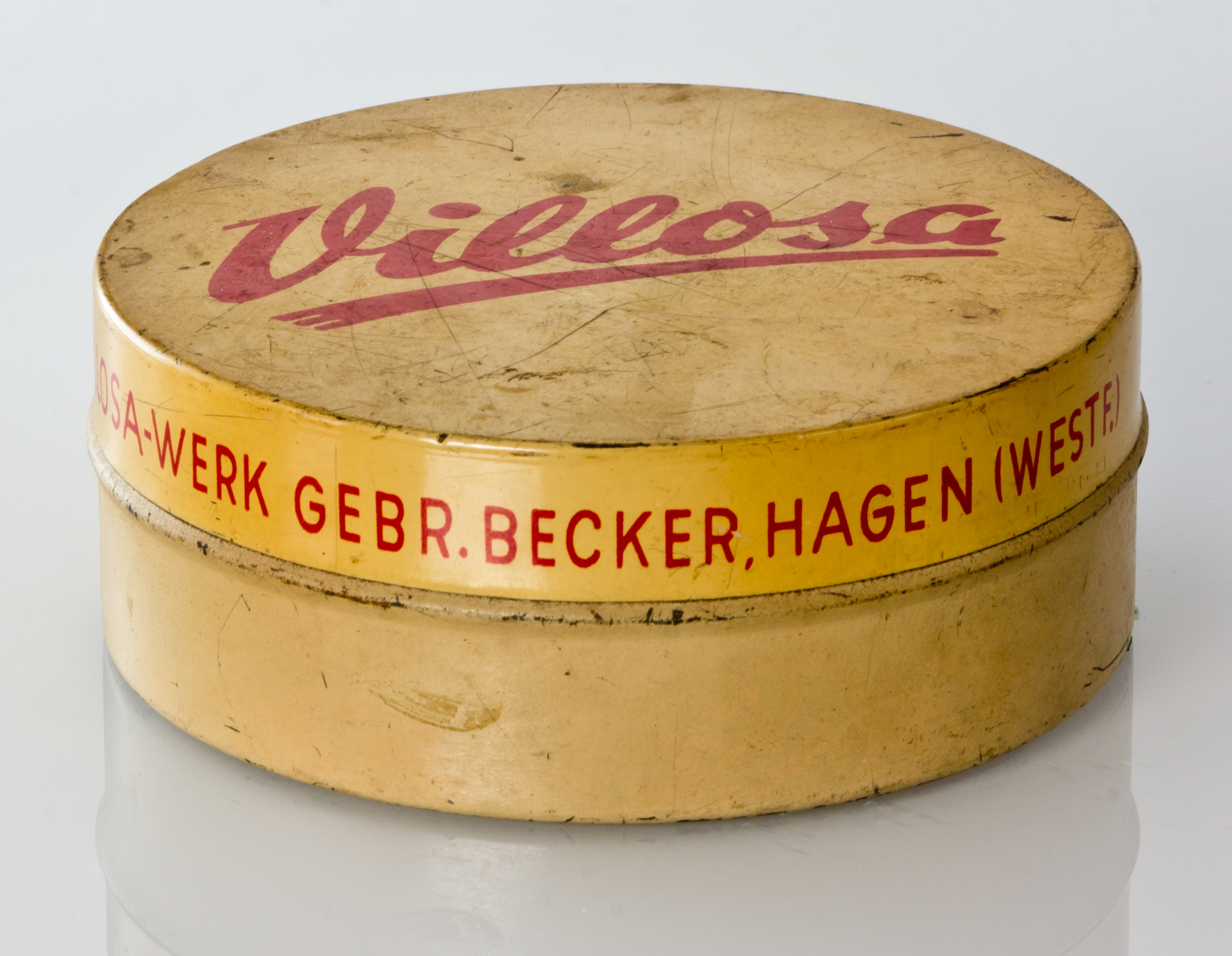 Alte Villosa-Dose